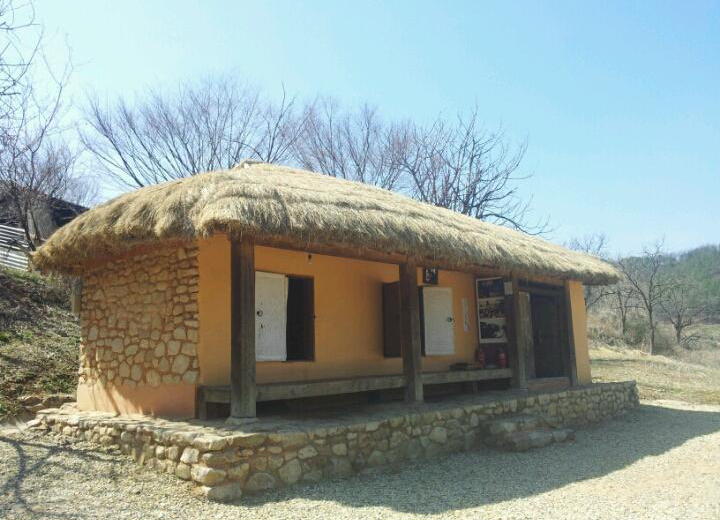 김수환 추기경 생가 (군위군 군위읍 군위금성로 276)